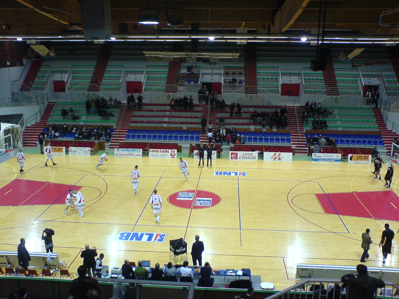 Slle du Complexe René Tys.